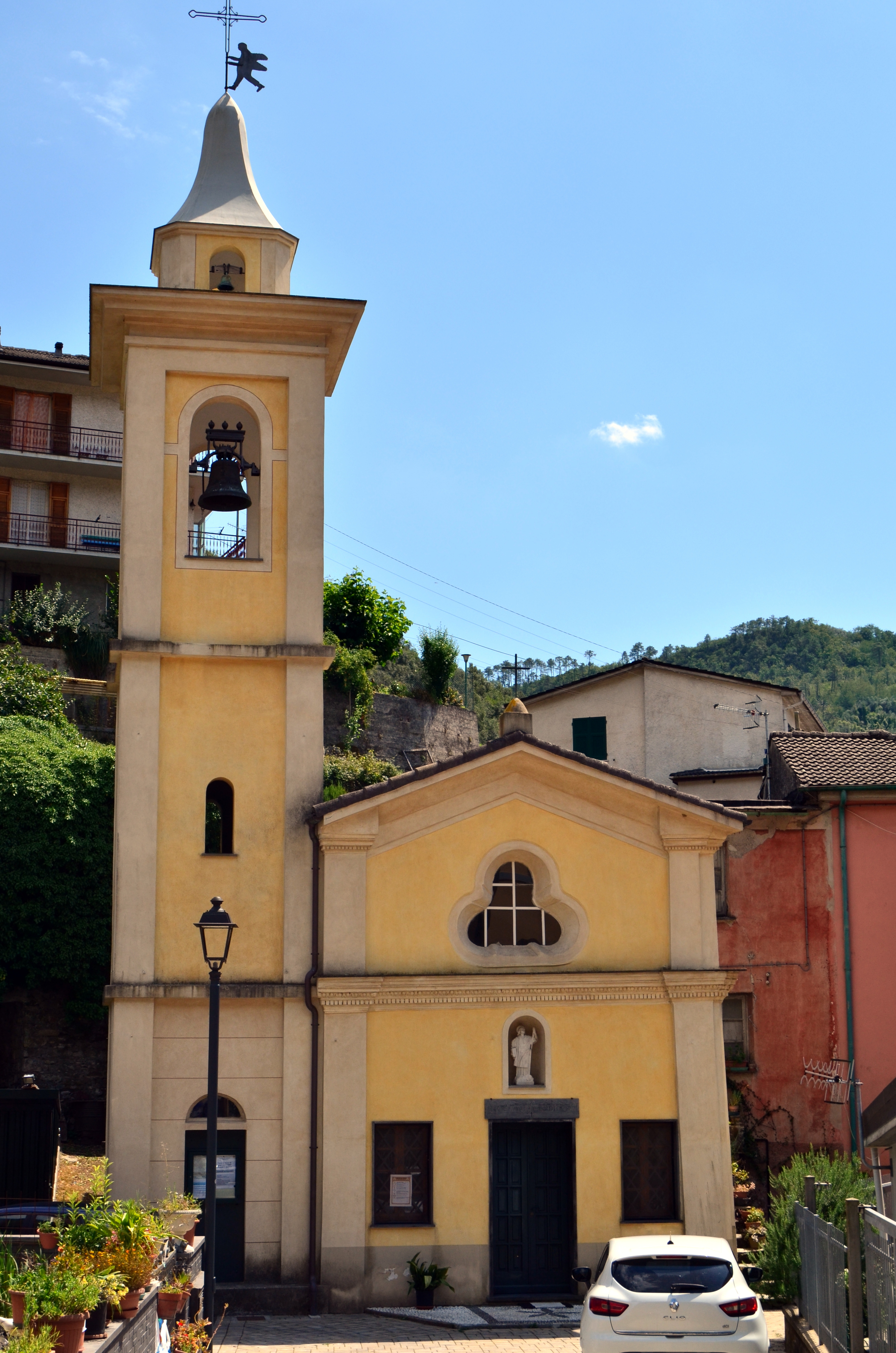 Cappella di San Lorenzo di Conscenti, Ne, Liguria, Italia